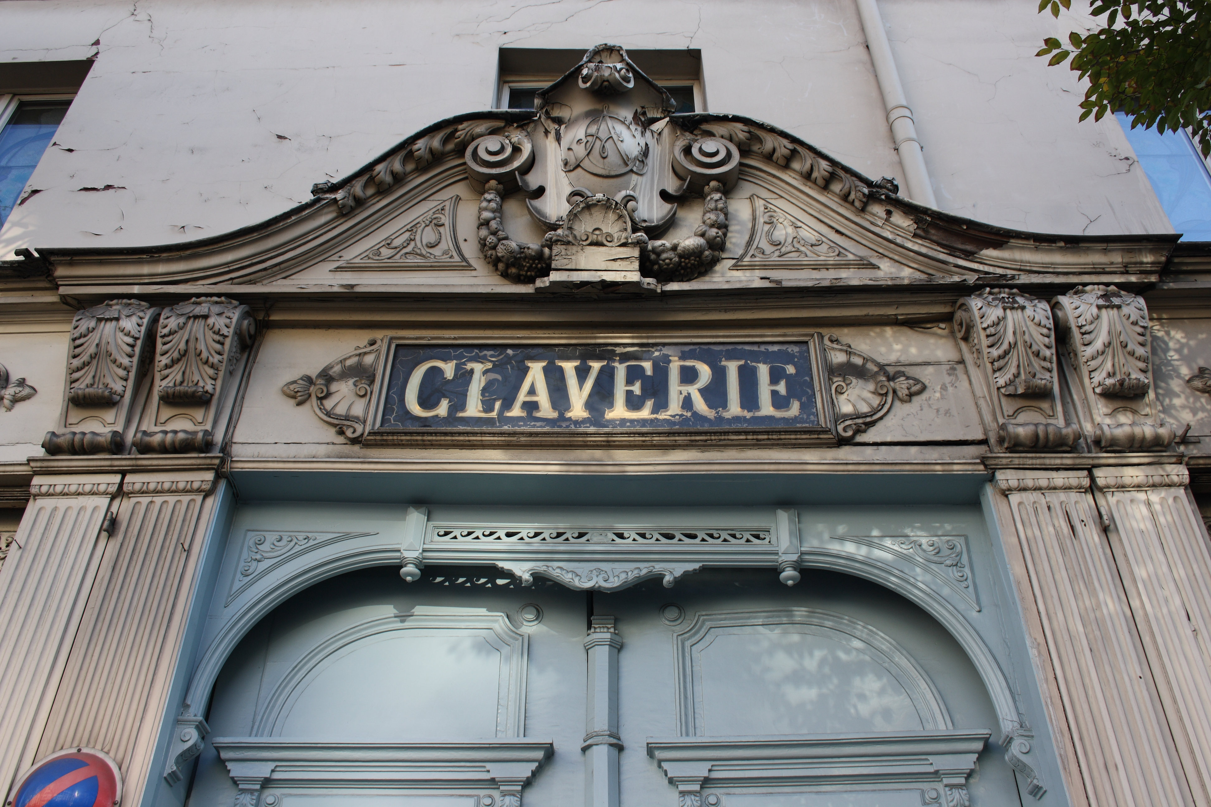 Haus 234, rue du Faubourg-Saint-Martin in Paris (10. Arrondissement)